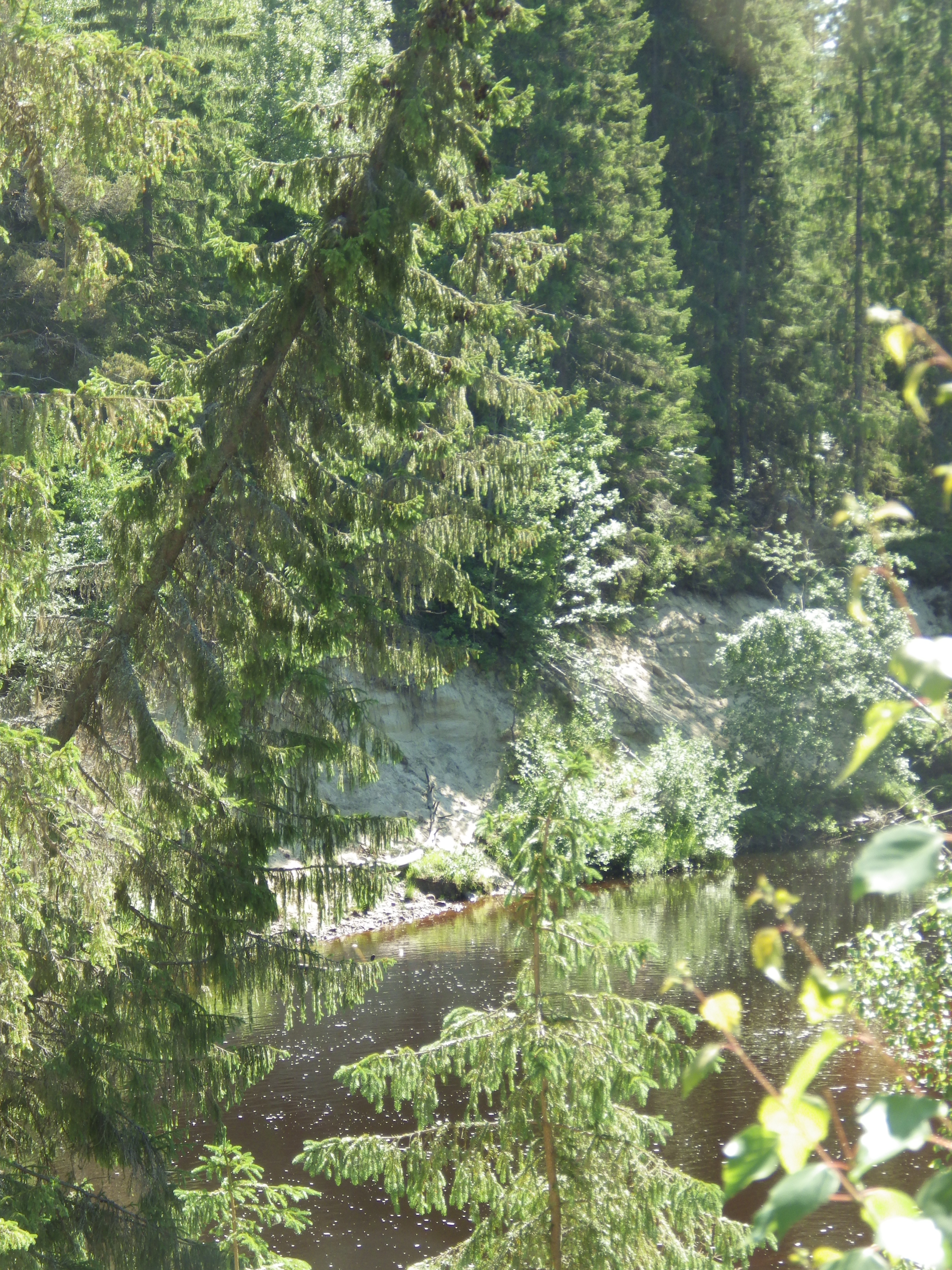 Vy nedströms Hörnån vid Ysseldalarna intill den lilla stugan vid nipan nedanför skjutbanan.